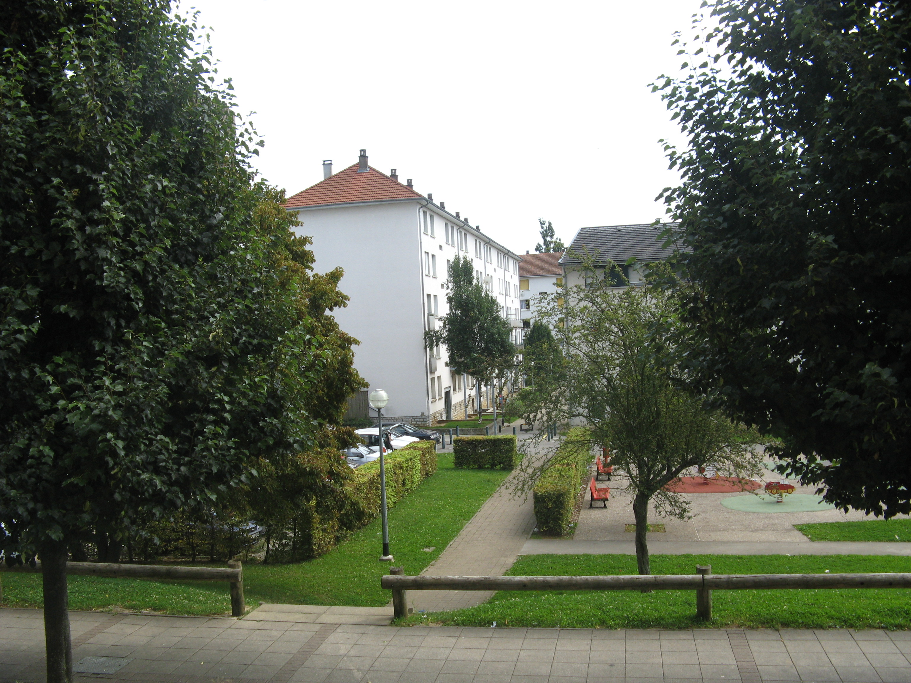 Orchamps